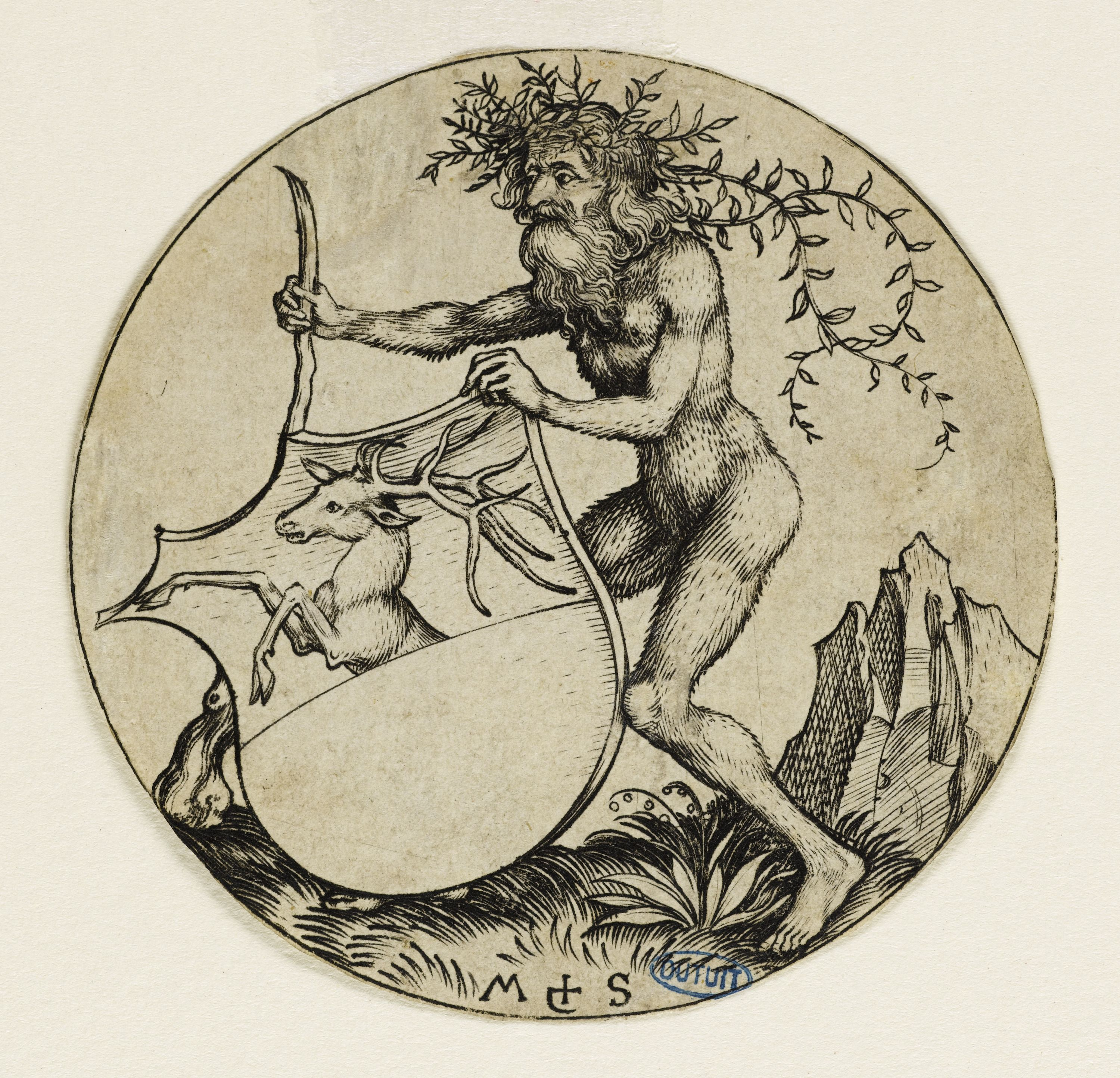 Gravure représentant un homme sauvage tenant un écu à la tête de cerf